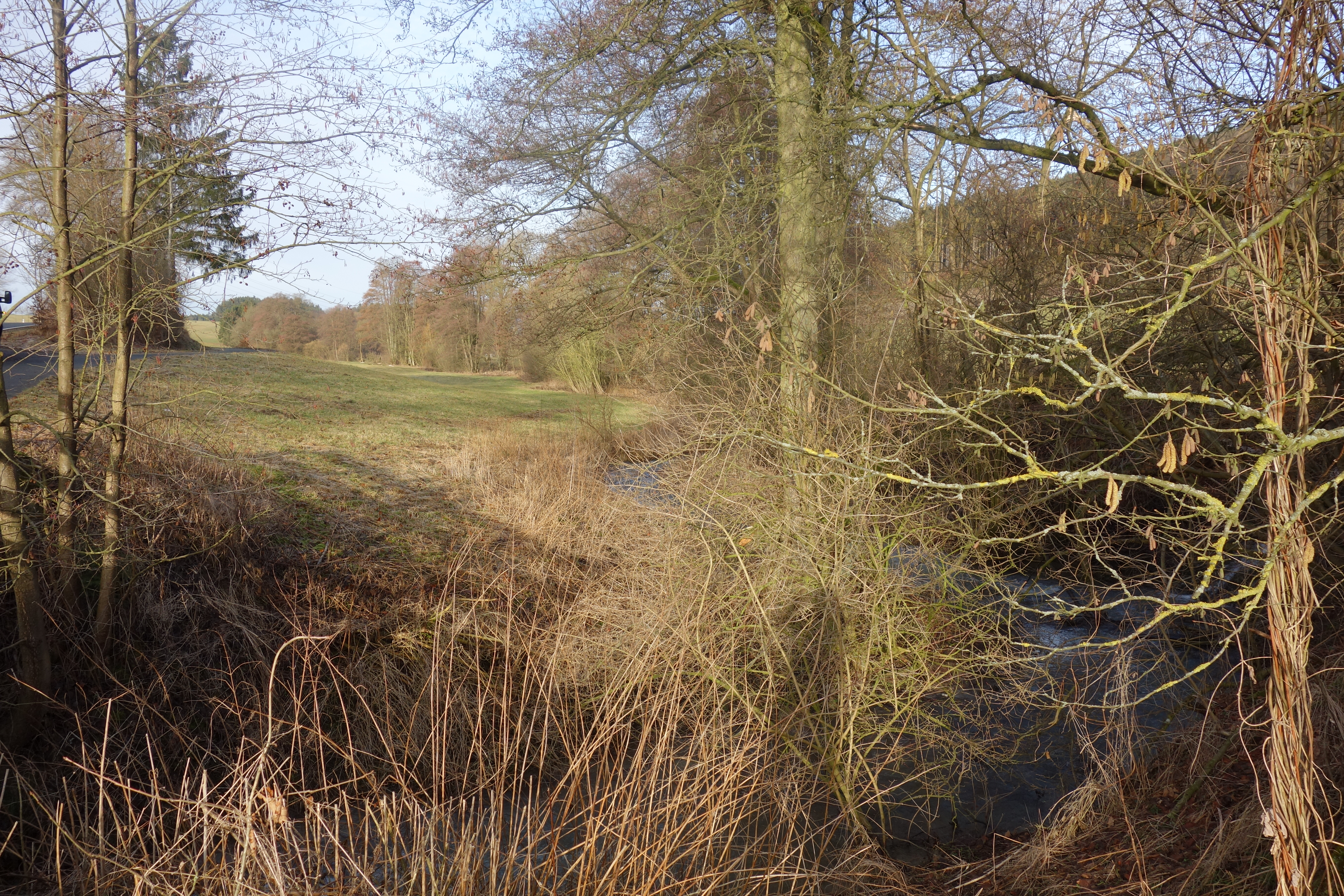 LSG Voßmecke und Wennetal zwischen Obringhausen und Niederberndorf in der Nähe von Ebbinghof.